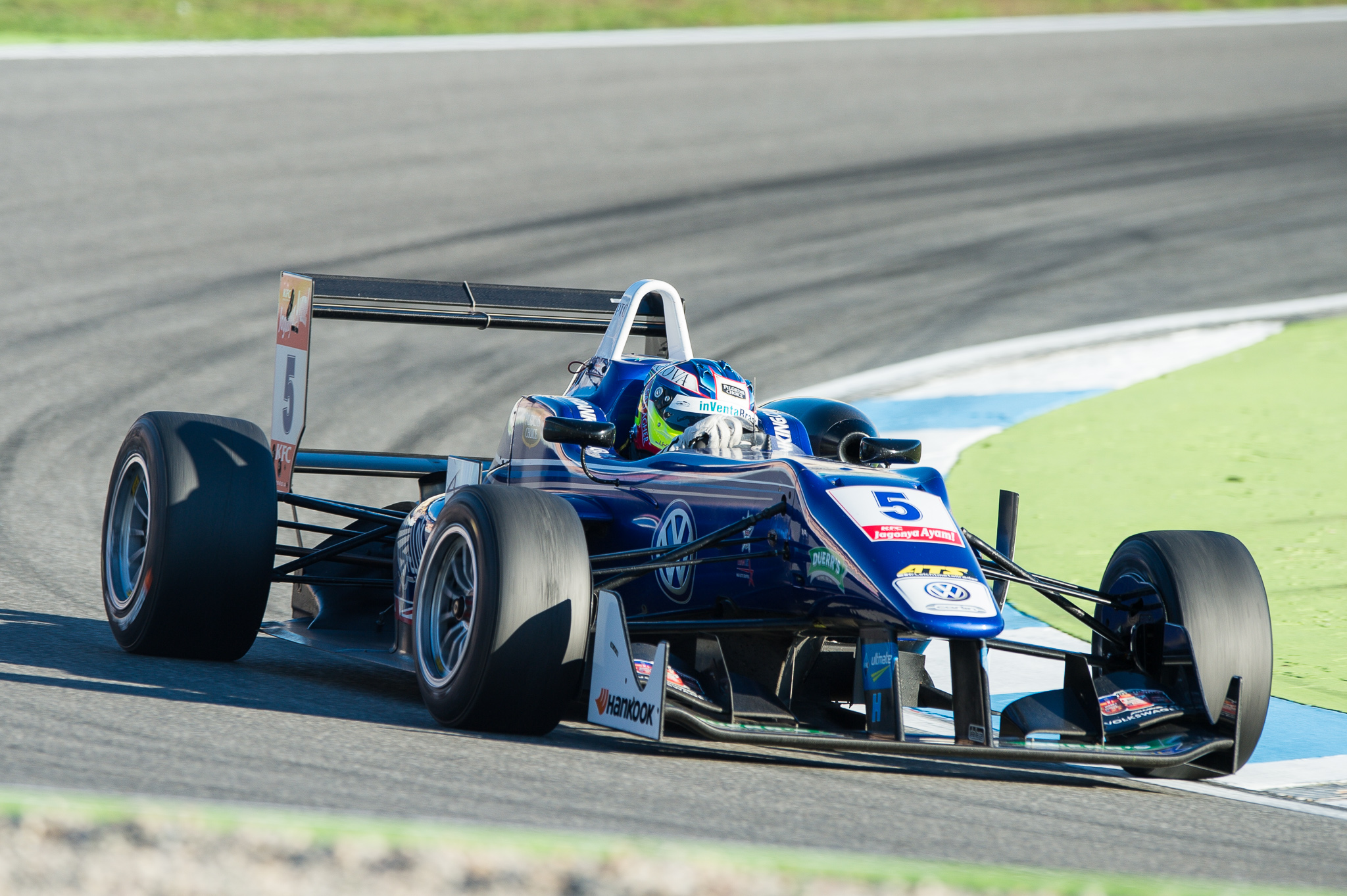 Carlin,DTM,Dallara F312,Deutsche Tourenwagen Masters,F3 FIA European Championship,FIA Formel 3 Europameisterschaft,Hockenheimring,Jordan King,Motorsport,Volkswagen